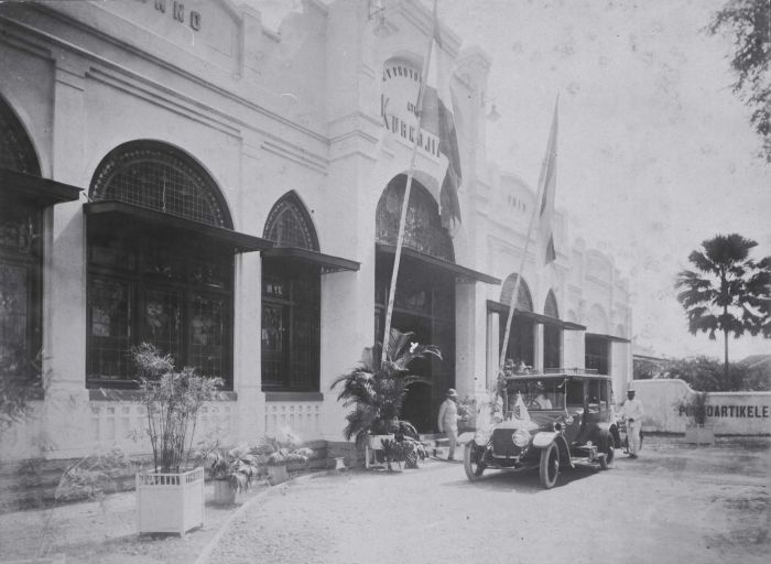 foto. Een man stapt in een auto die staat te wachten voor de fotostudio van de N.V. Photografisch Atelier Kurkdjian te Soerabaja Photografisch Atelier Kurkdjian